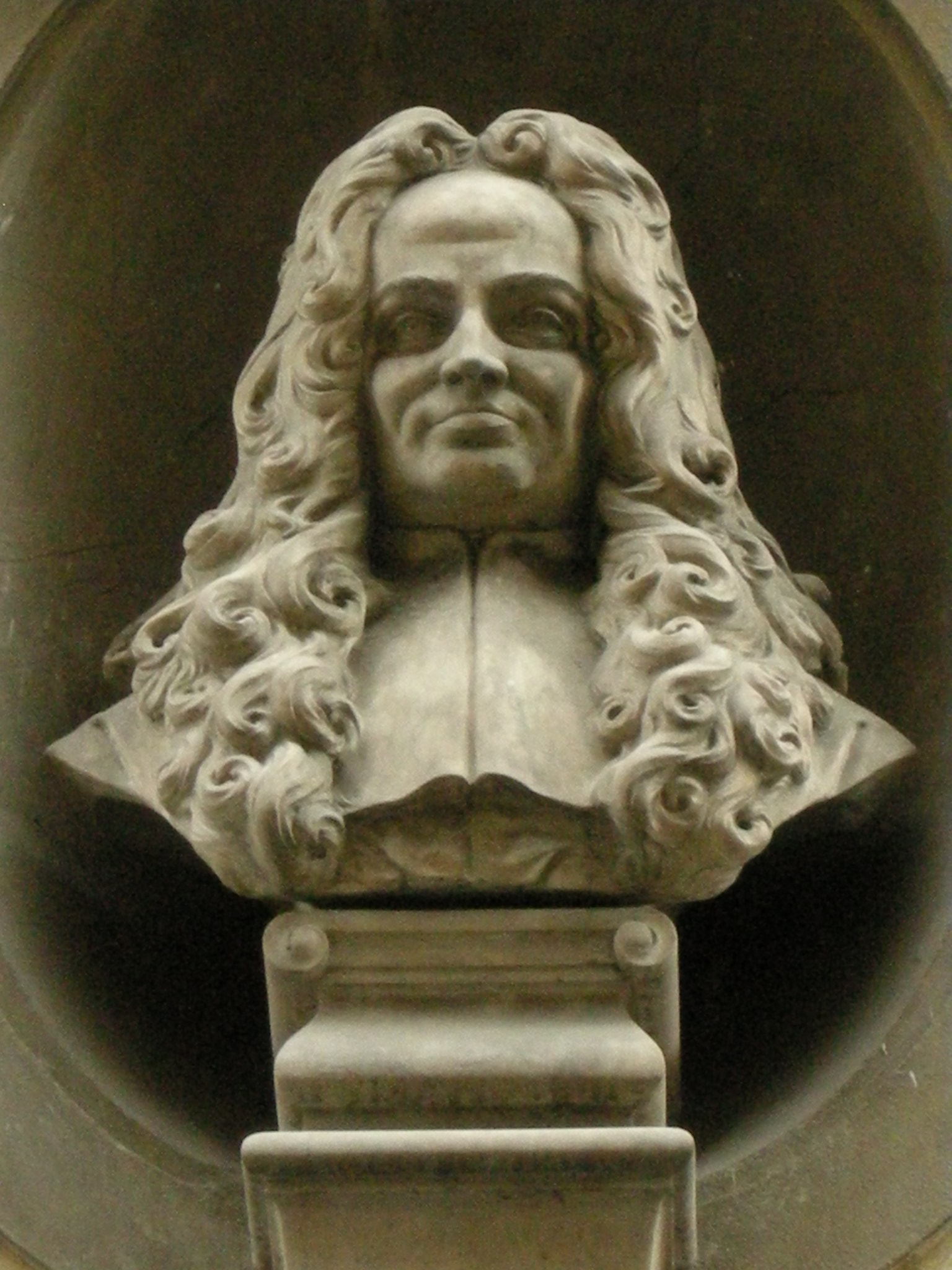 Vincenzo da filicaja